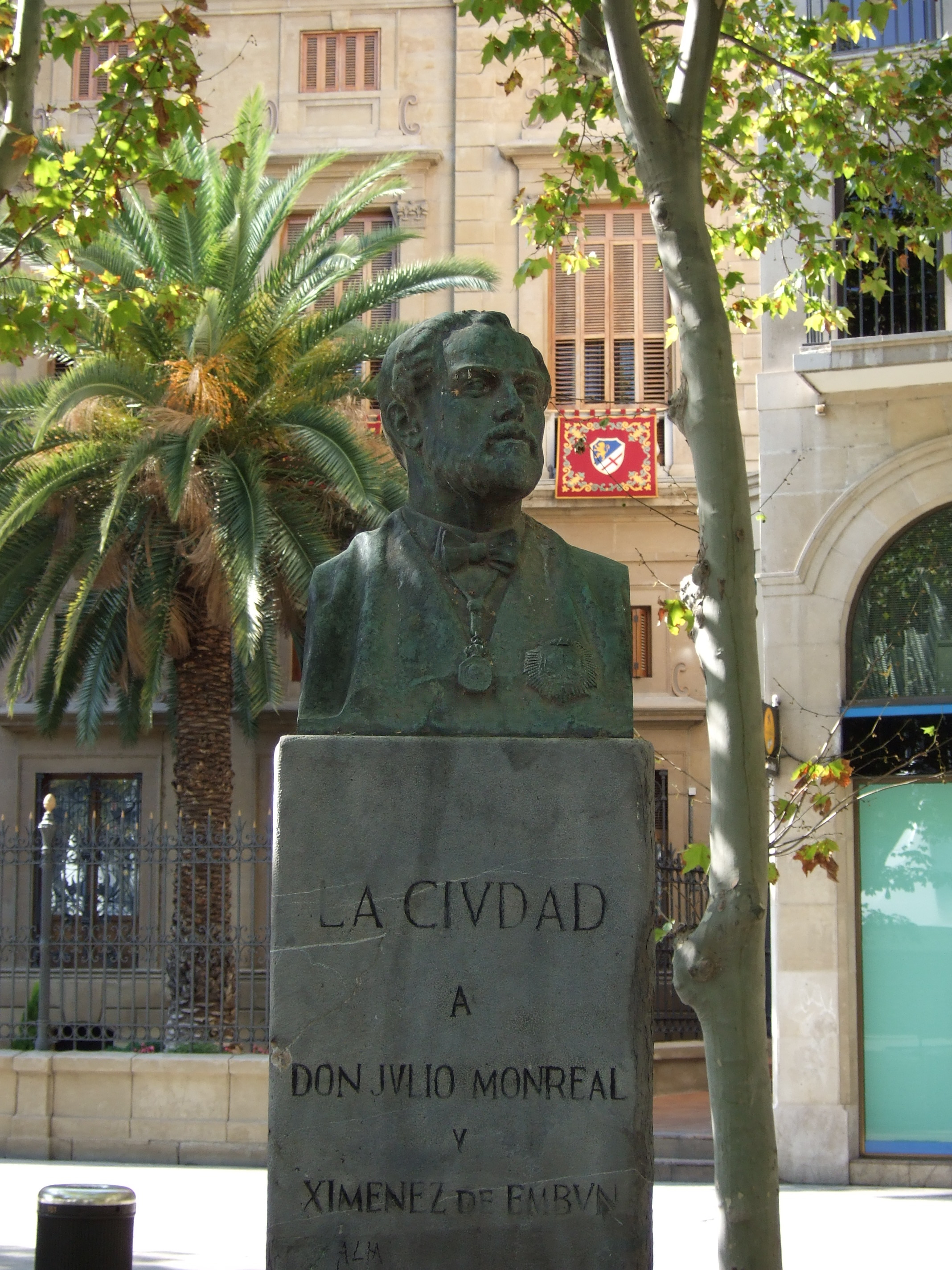 Zaragoza - Busto dedicado a Julio Monreal y Ximénez de Embún